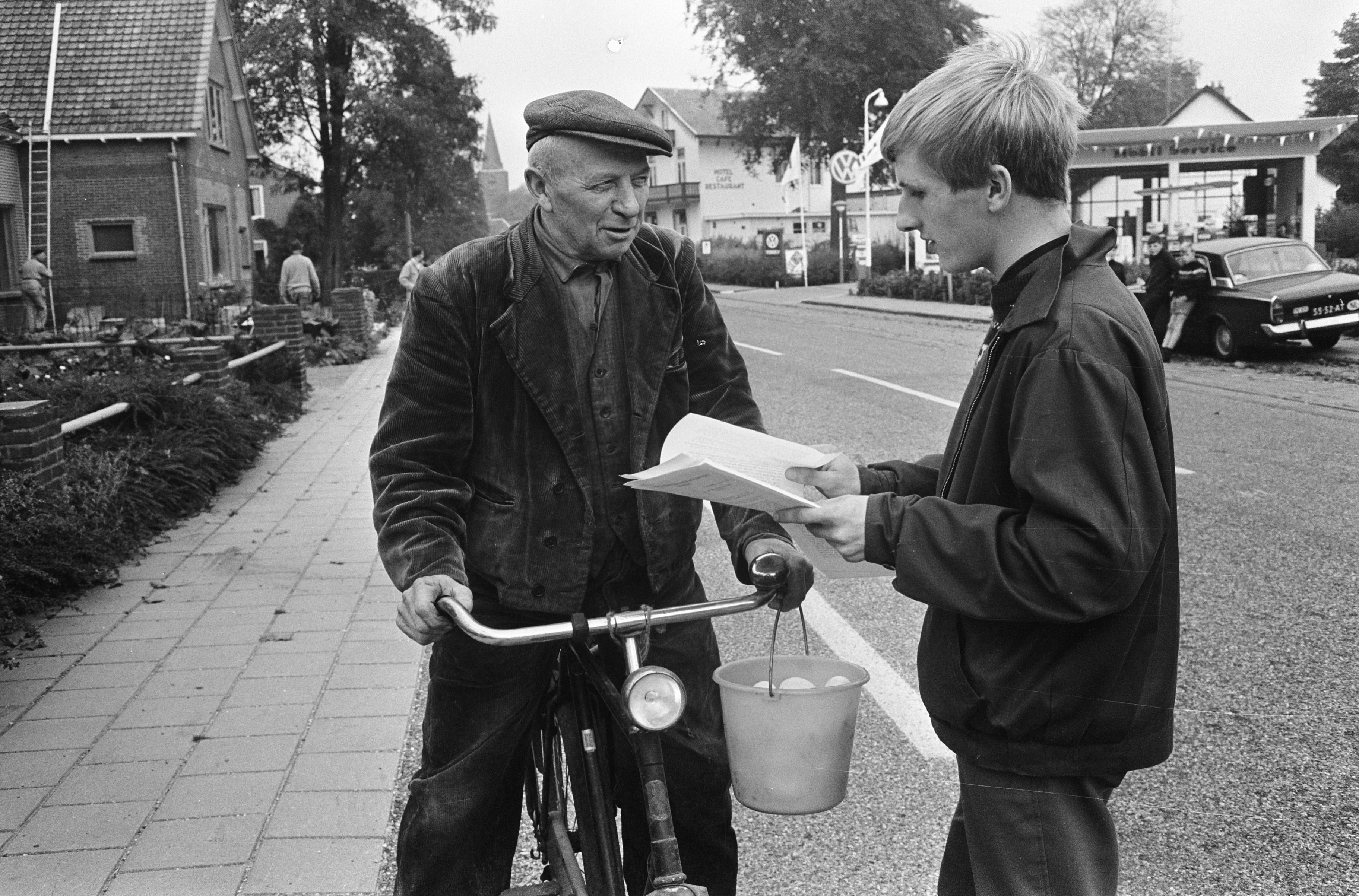 Collectie / Archief : Fotocollectie Anefo Reportage / Serie : Demonstratie "Door de eeuwen heen" te Bennekom Beschrijving : Demonstranten voor het huis van boer Koekkoek van de Boerenpartij delen pamfletten uit aan voorbijgangers Datum : 14 oktober 1966 Locatie : Bennekom, Gelderland Trefwoorden : demonstranten, demonstraties, pamfletten Fotograaf : Fotograaf Onbekend / Anefo Auteursrechthebbende : Nationaal Archief Materiaalsoort : Negatief (zwart/wit) Nummer archiefinventaris : bekijk toegang 2.24.01.05 Bestanddeelnummer : 919-6847